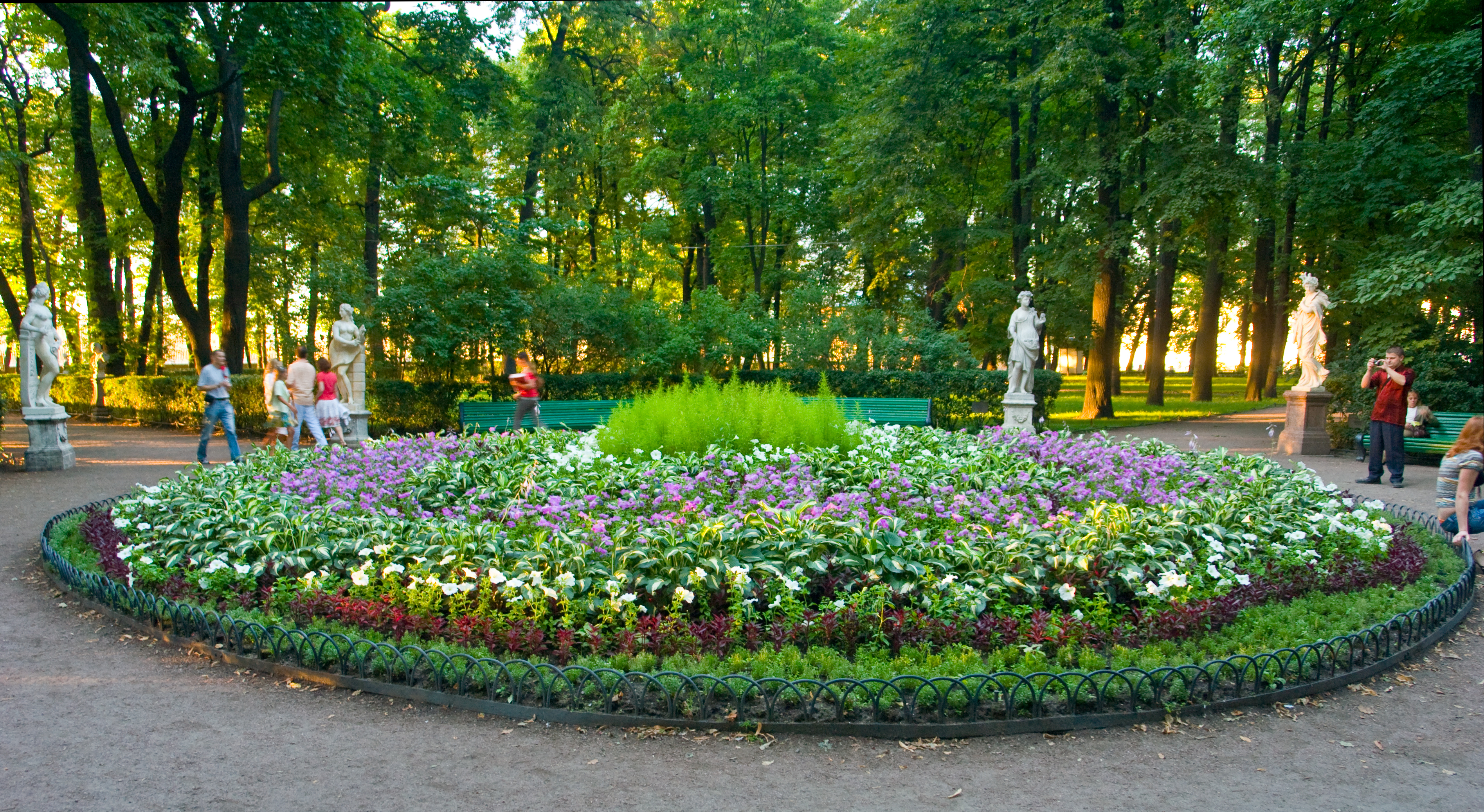 Газон в Летнем саду.